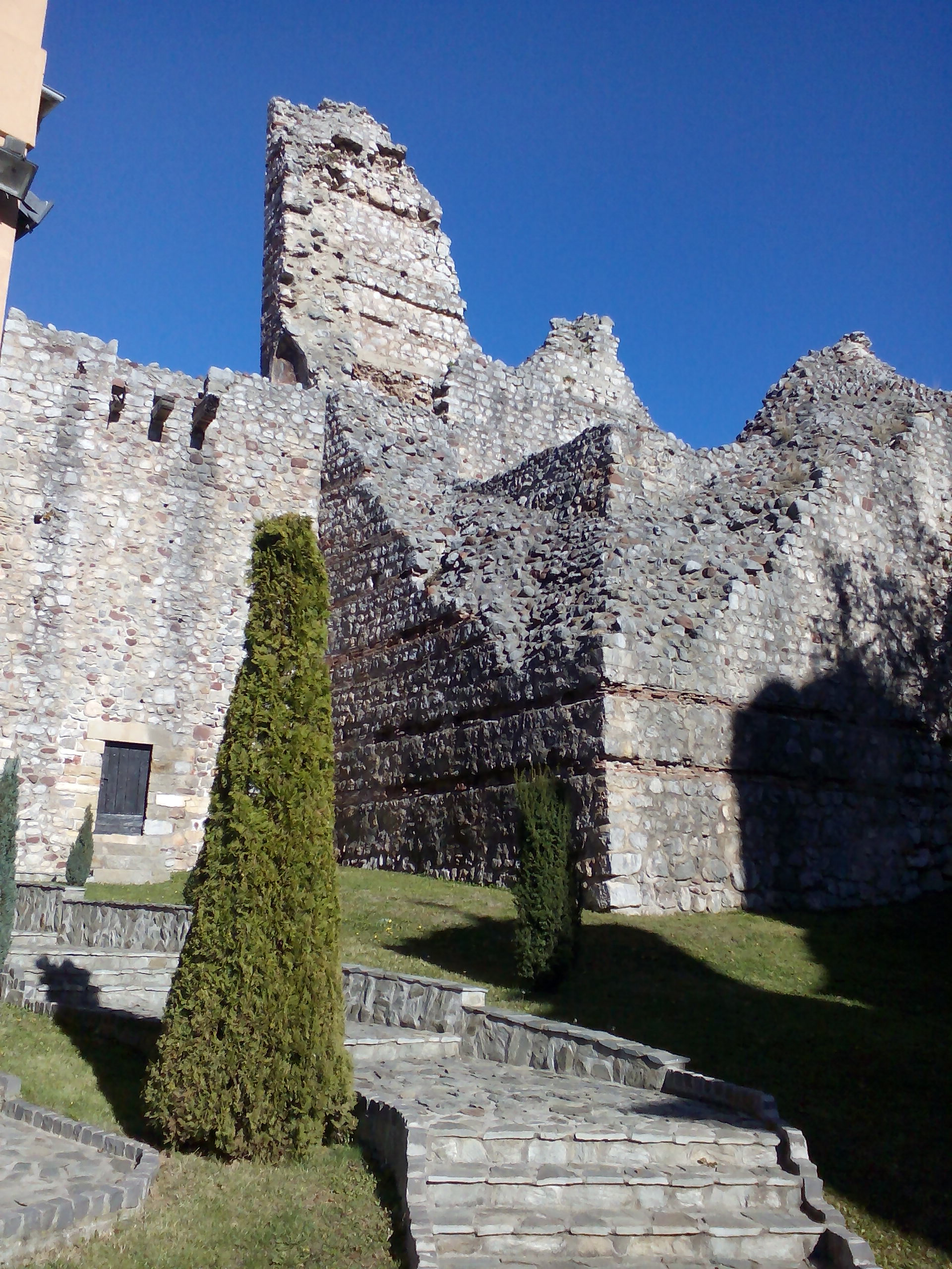 Детаљ из Манастира Раваница